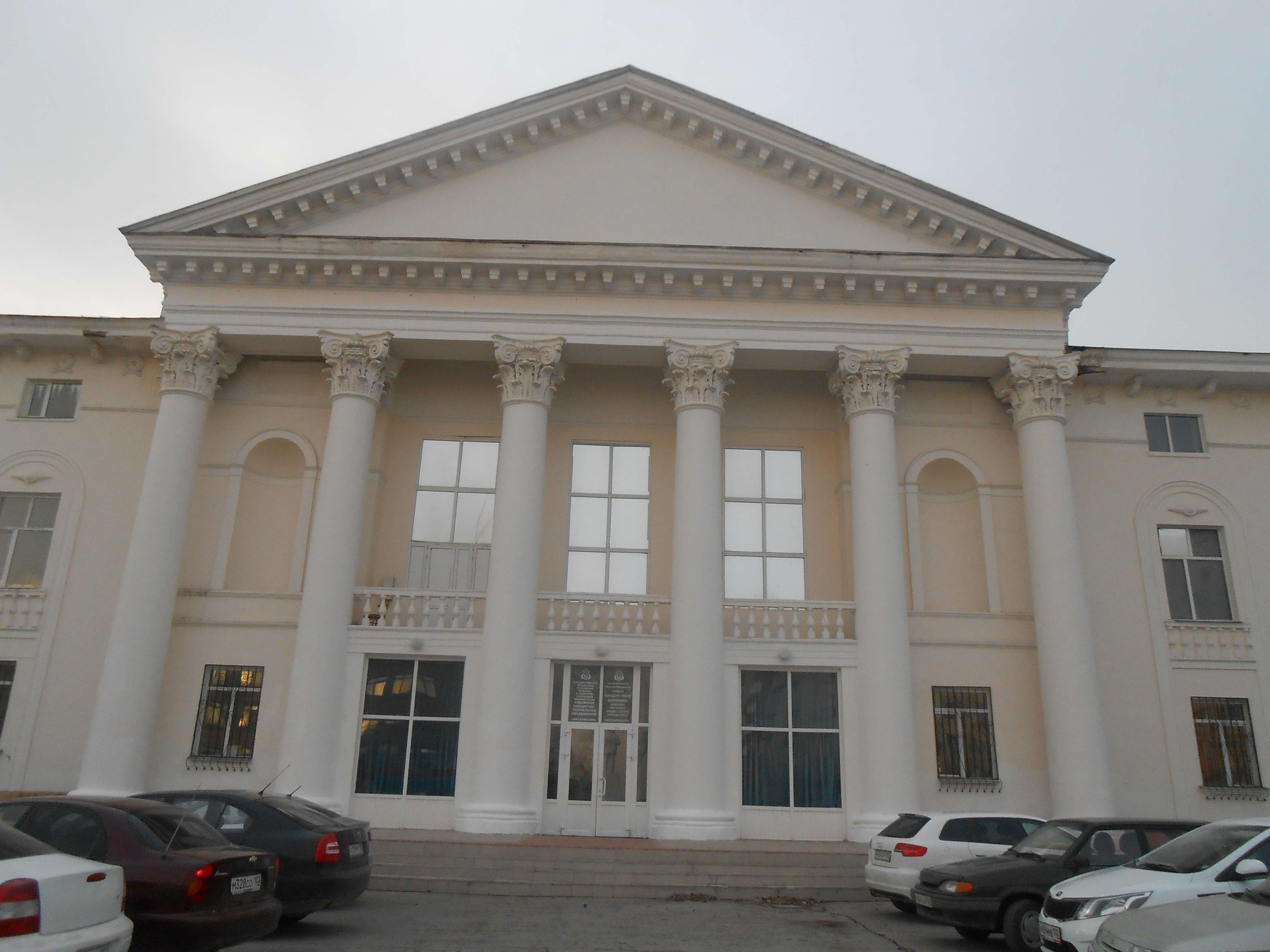 Сибайская государственная филармония г. Сибай